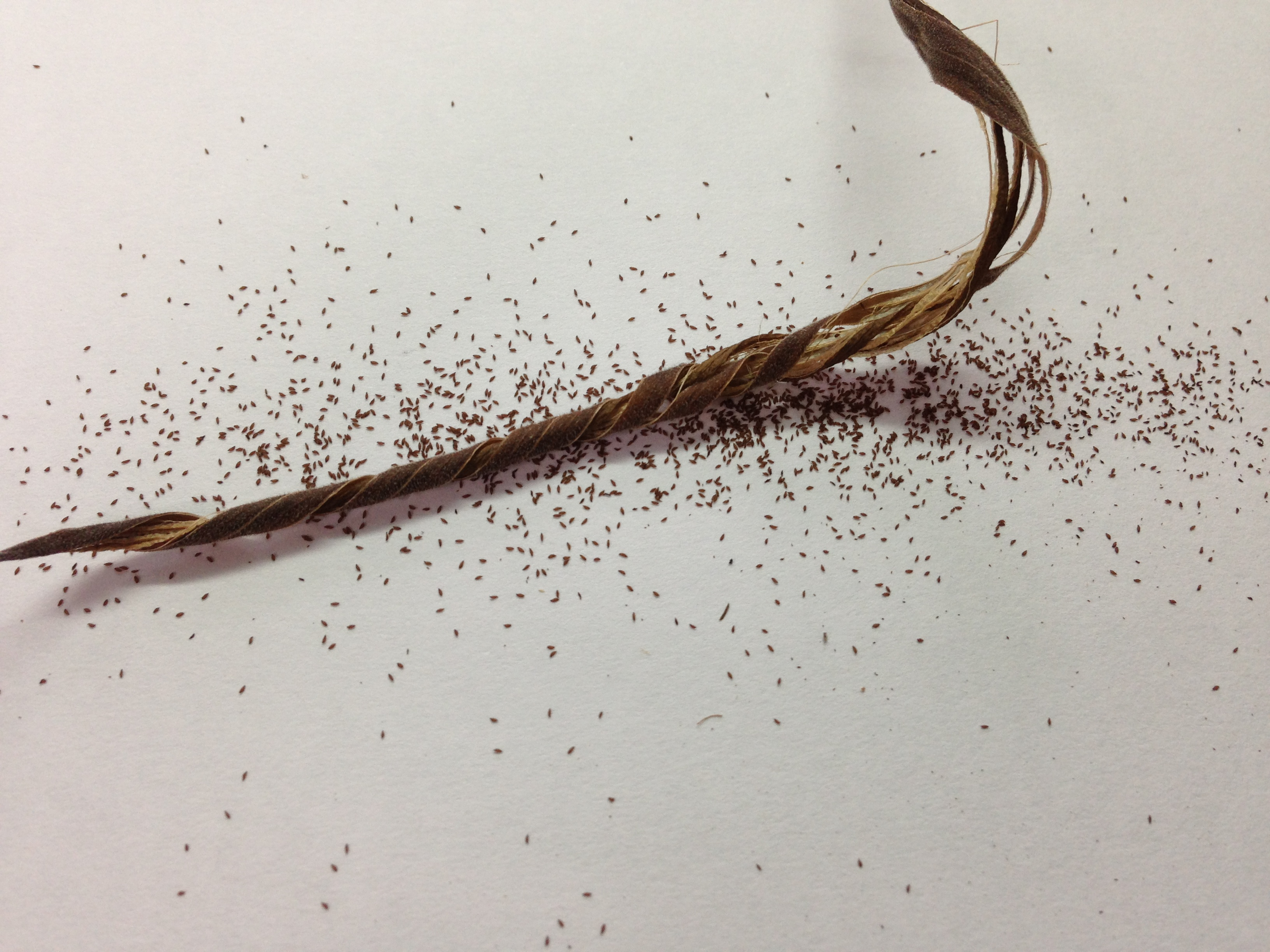 旋果苣苔果實3